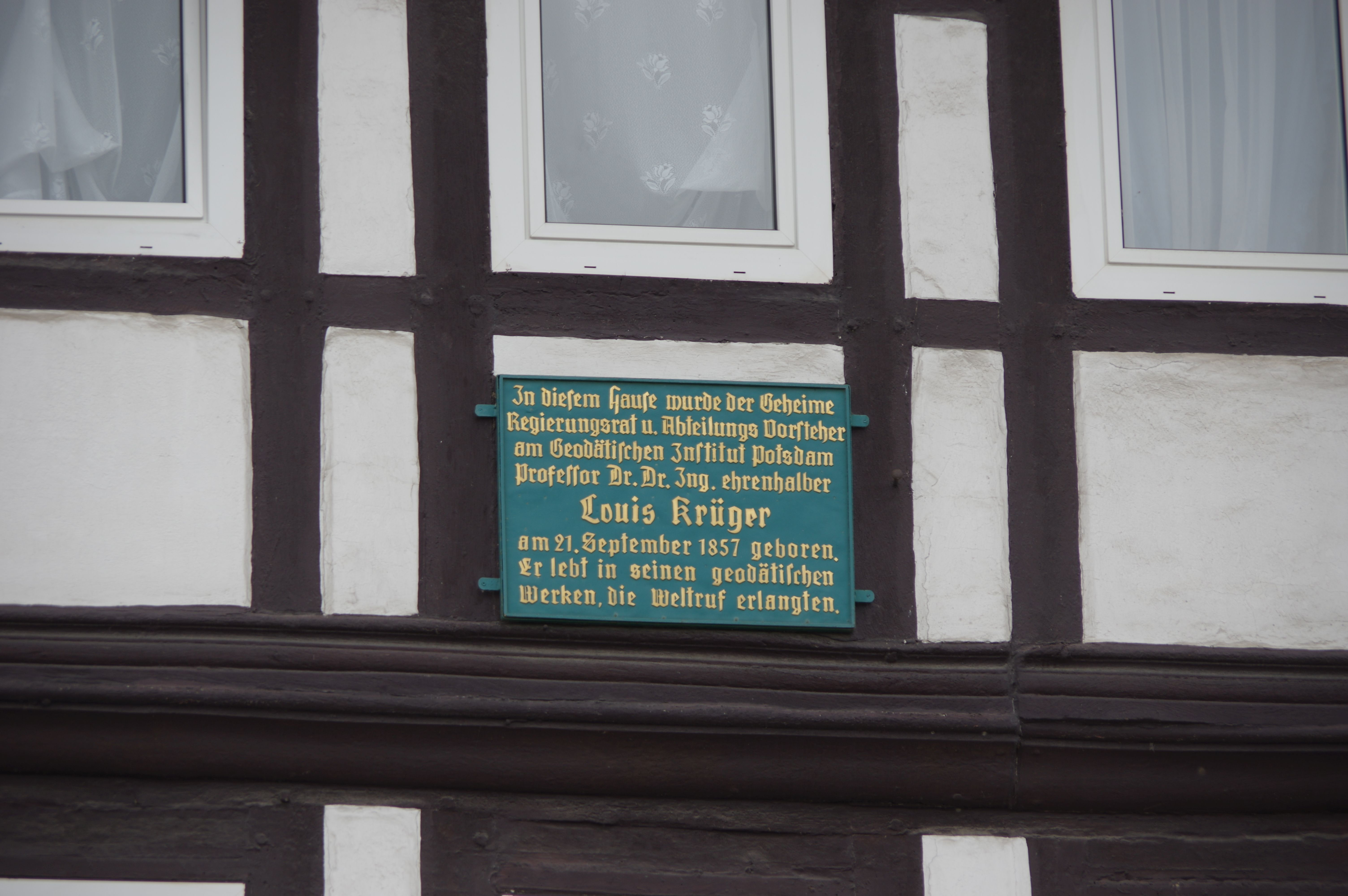 Elze in Niedersachsen. Die Tafel am Wohnhaus von Louis Krüger, der hier in Elze geboren wurde und starb.